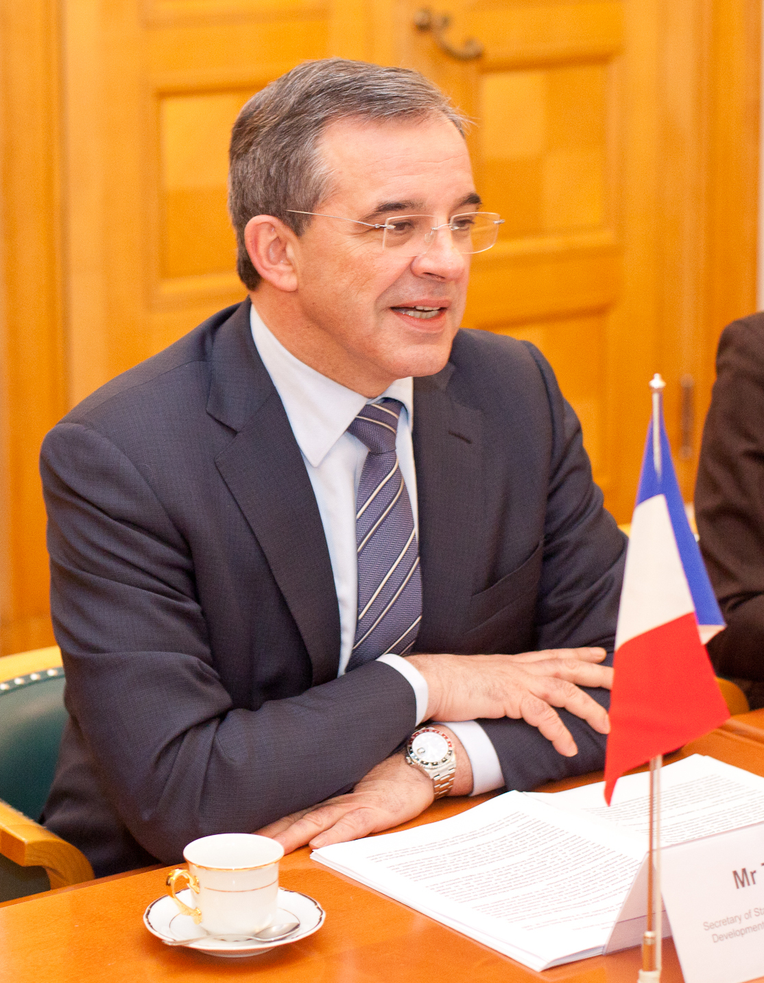 Foto: Toms Norde, Valsts kanceleja